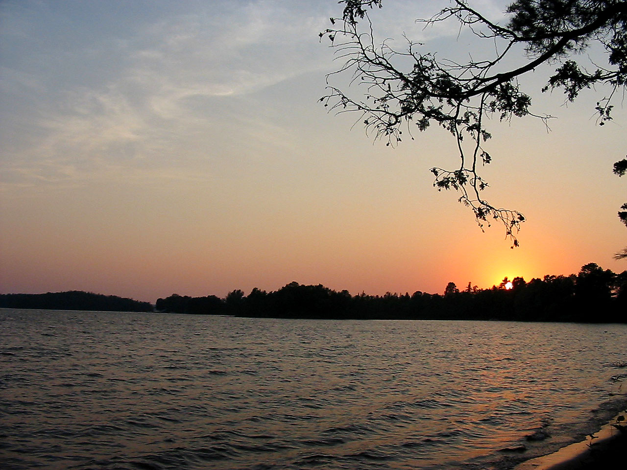 Sunset at Golden Lake